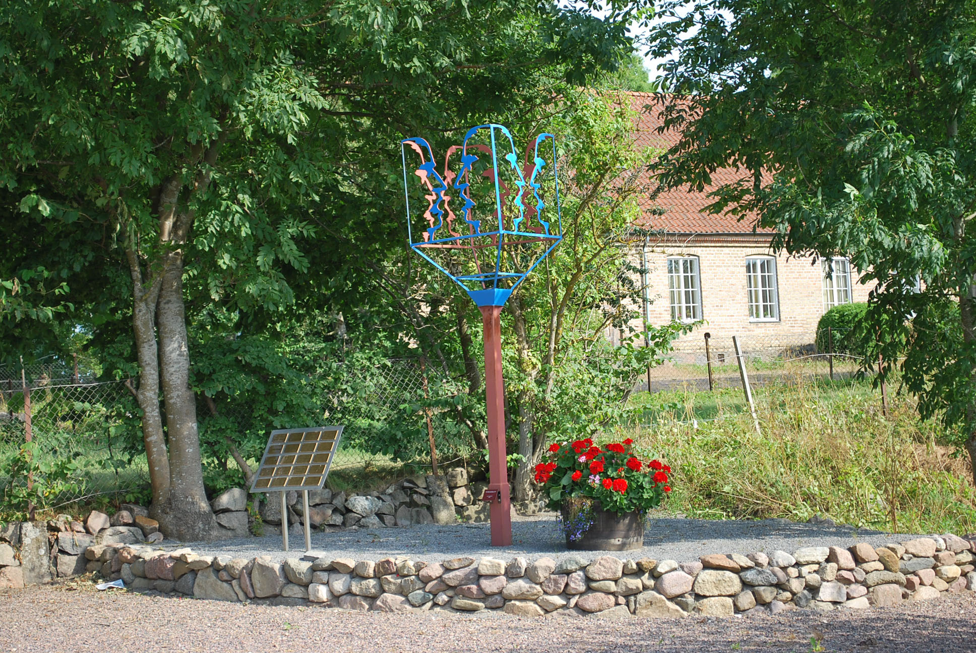 Alf Olsson, Torgdebatt, cortenstål, Gärdslöv